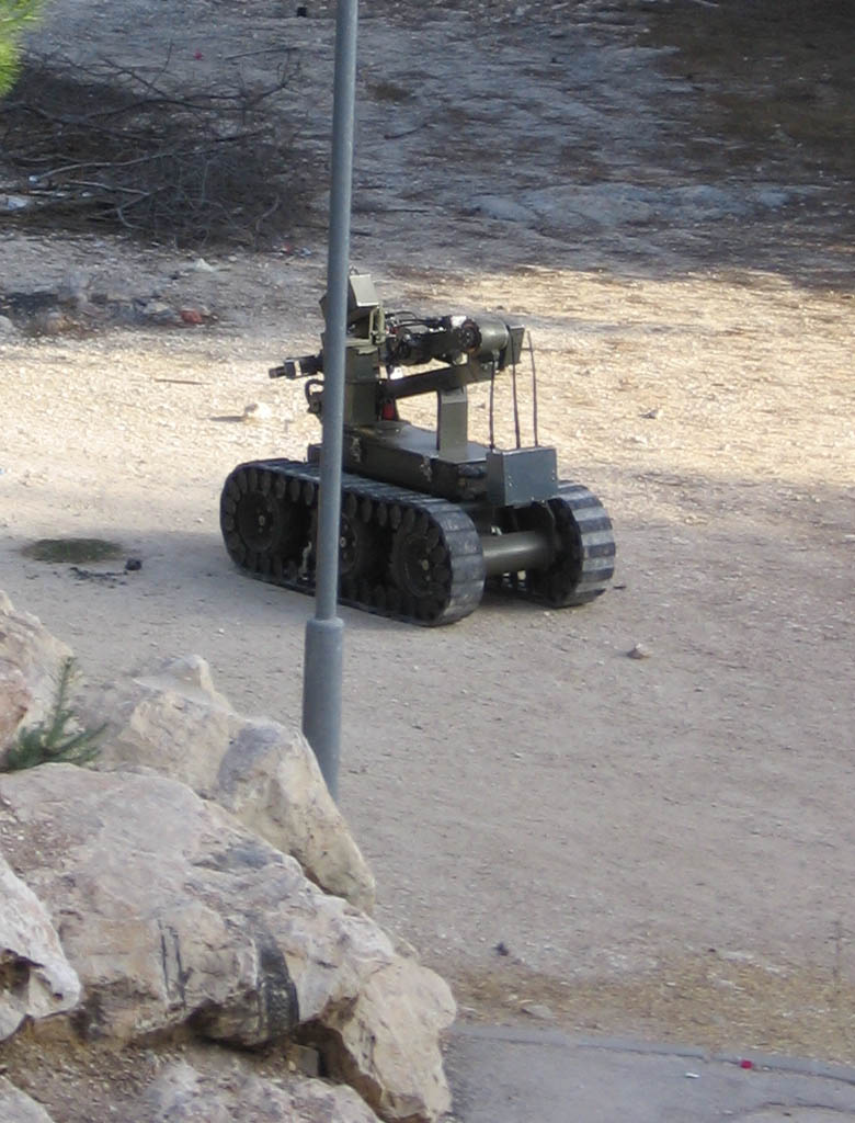 Ein Roboter der israelischen Polizei auf dem Weg zu einem verdächtigen Gegenstand in einem Studentenwohnheim in Jerusalem.